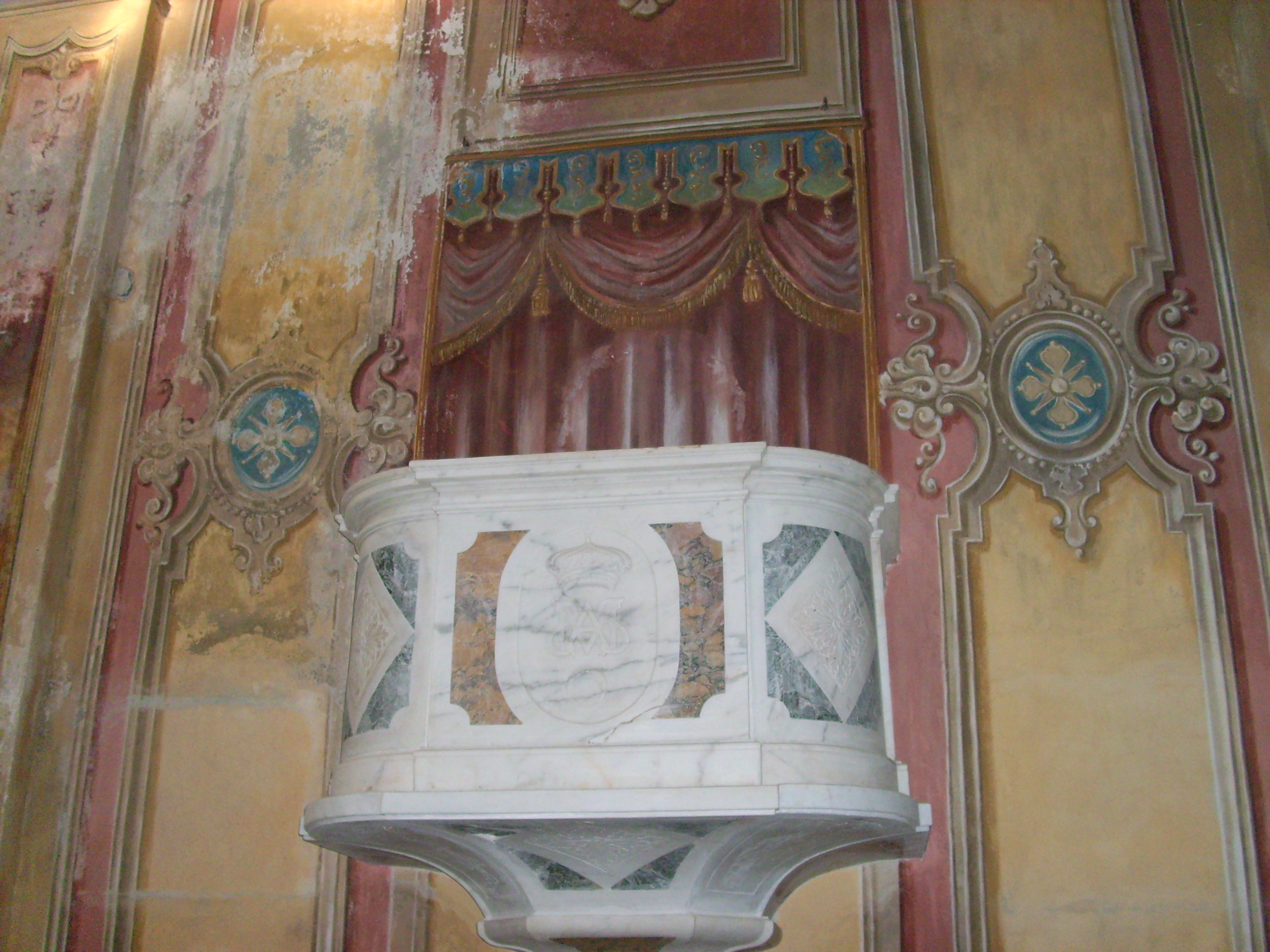 Santuario di Nostra Signora di Soviore, Monterosso al Mare, Liguria, Italia